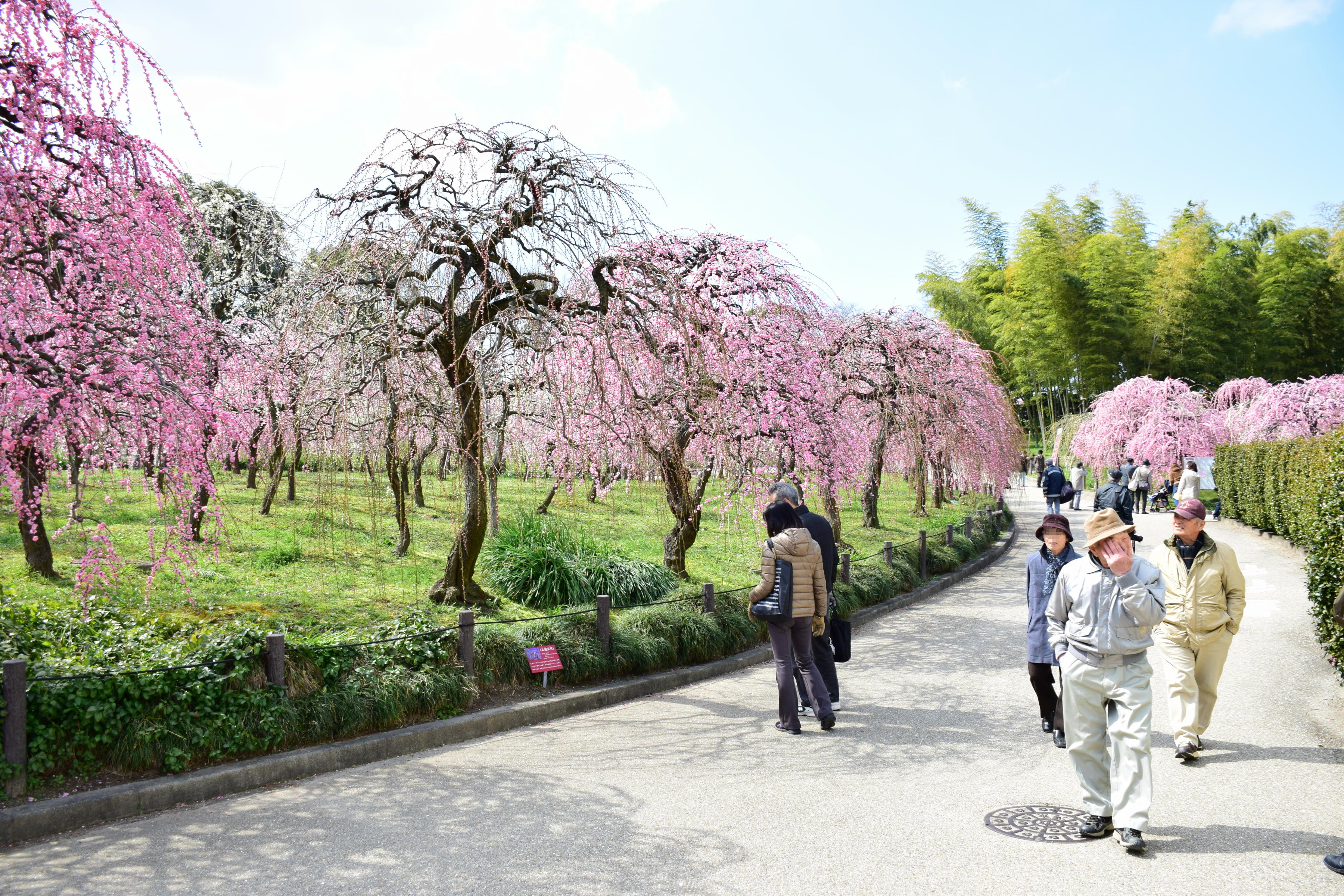 名古屋市農業センター